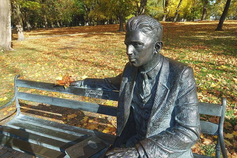 Ławeczka Jerzego Różyckiego w parku miejskim w Wyszkowie. W pobliżu tego miejsca stało gimnazjum, w którym uczył się i zadał maturę Jerzy Różycki.